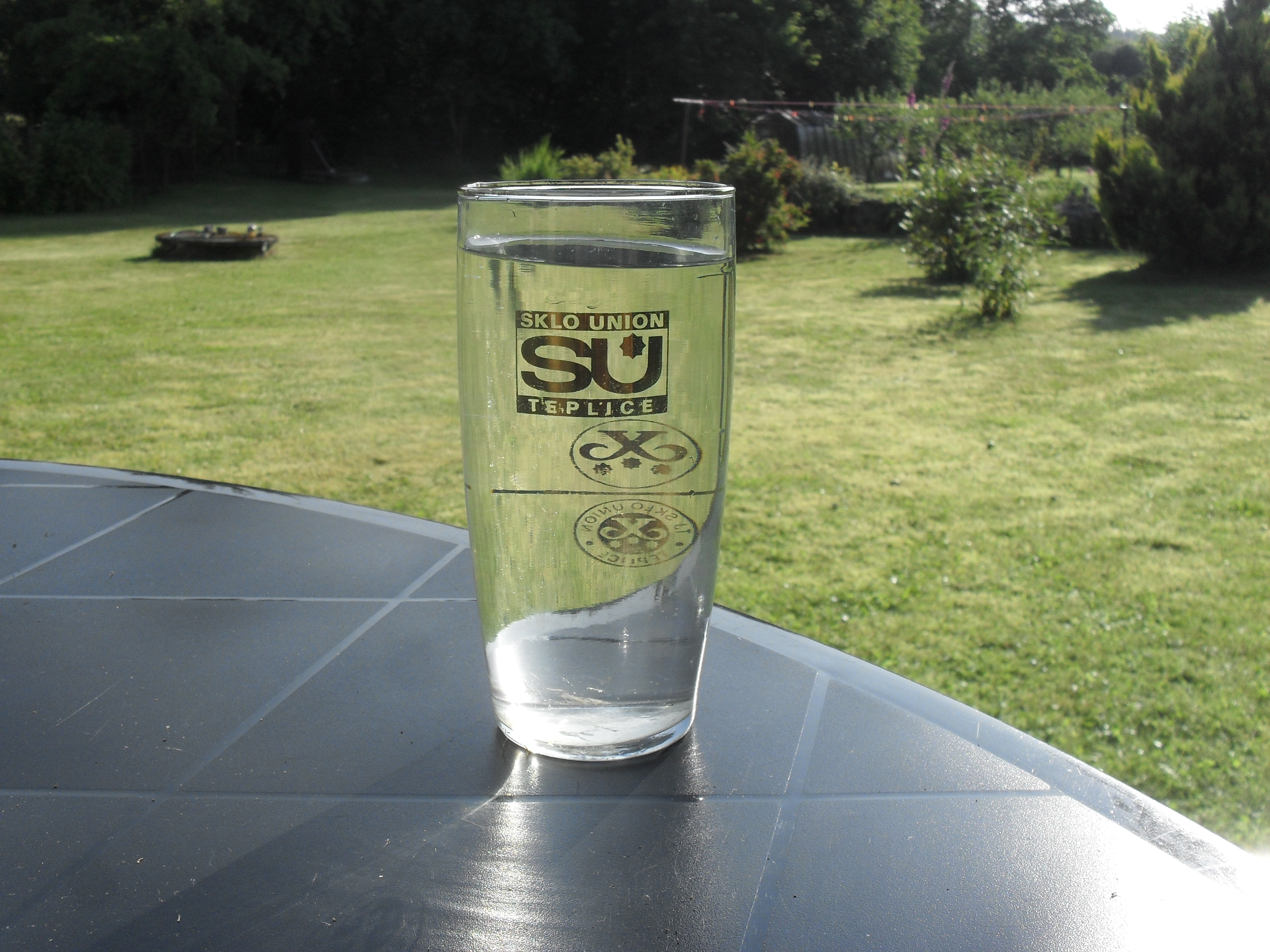 Reklamní sklenice, dnes již zaniklé, společnosti Sklo union Teplice